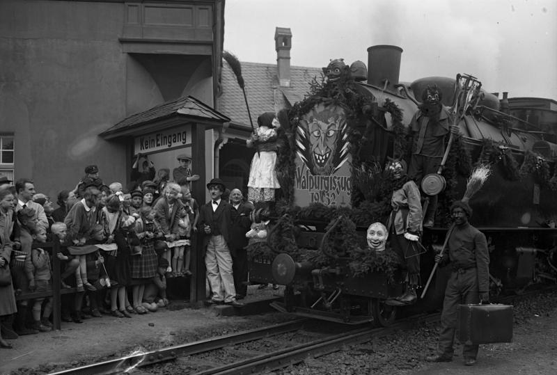 Die grosse Walpurgisfeier auf dem Brocken im Harz ! Der heilige Gedächtnistag der Patronin "Walpurga" gegen Hexenkünste ! Als Hexen und Kobolde verkleidet ziehen die Geister mit dem Walpurgiszug hinauf zum Blocksberg.